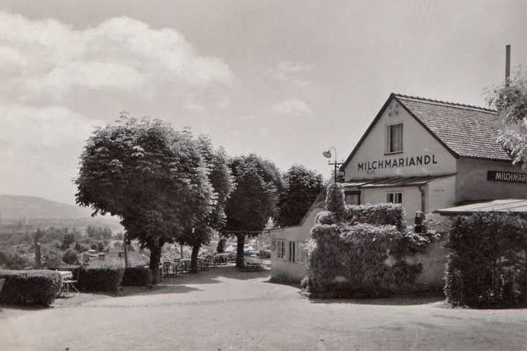 Gasthaus Milchmariandl am Freinberg, Linz